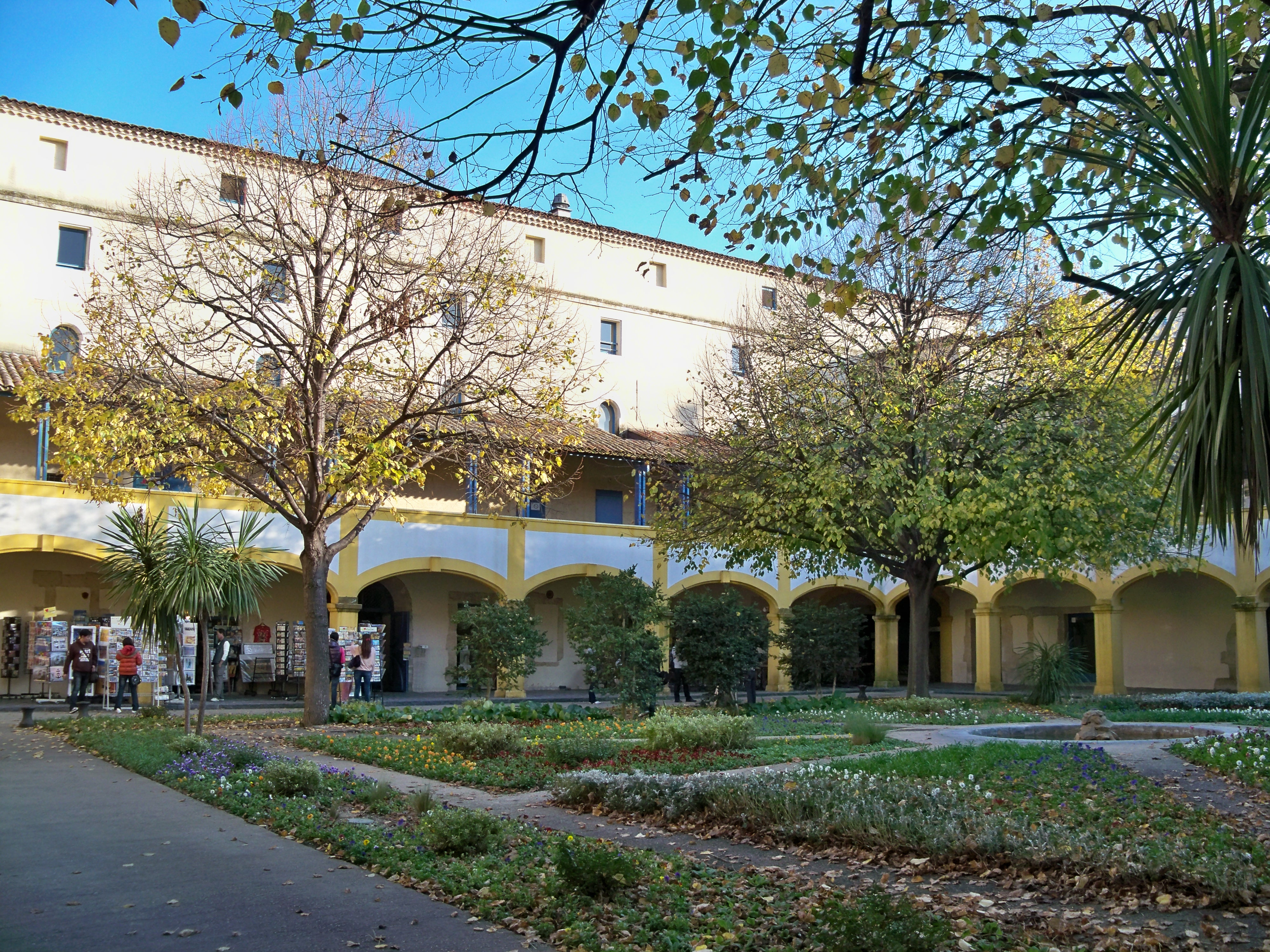 cours de l'espace Van Gogh à Arles (13)